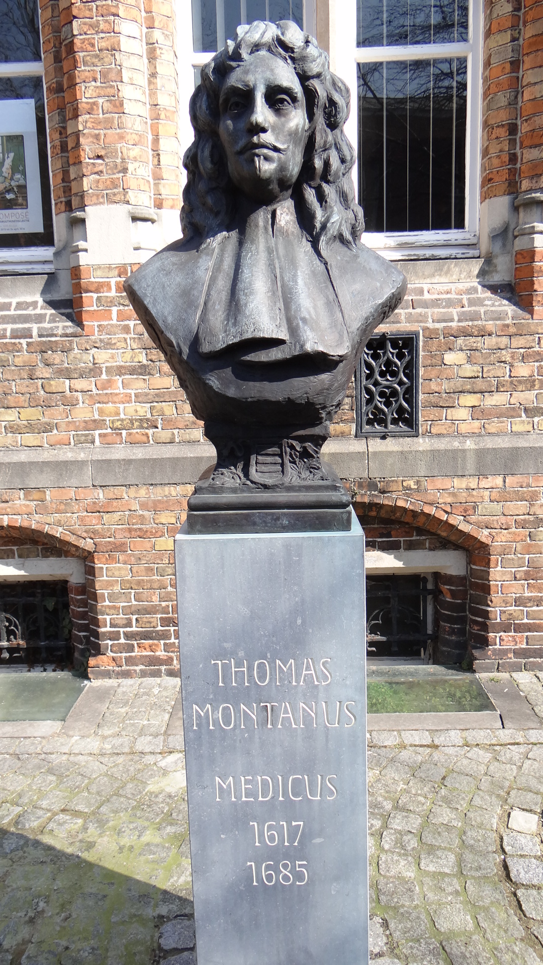 Buste de Thomas Montanus à Brugges